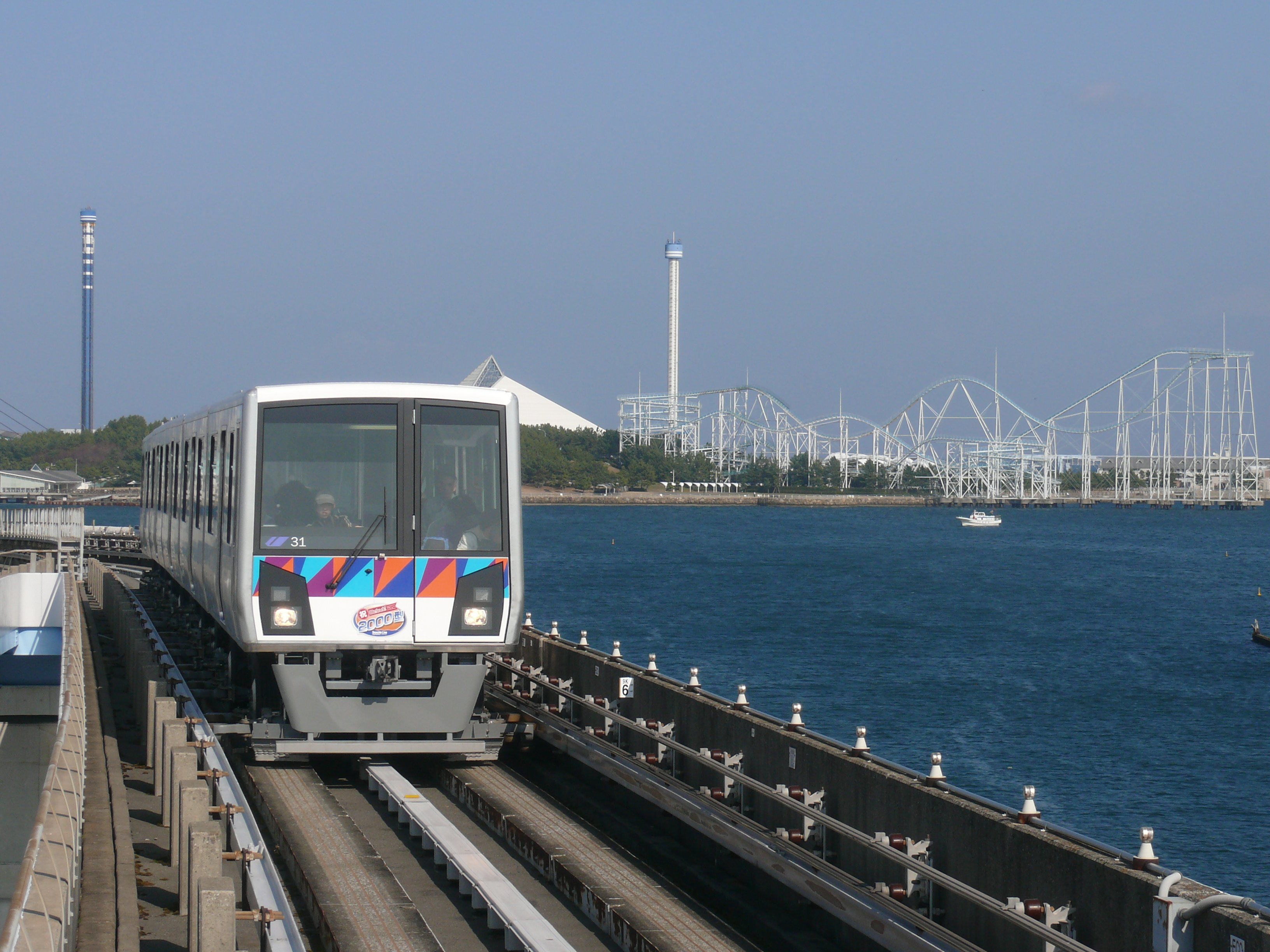 金沢シーサイドライン2000形。seaside